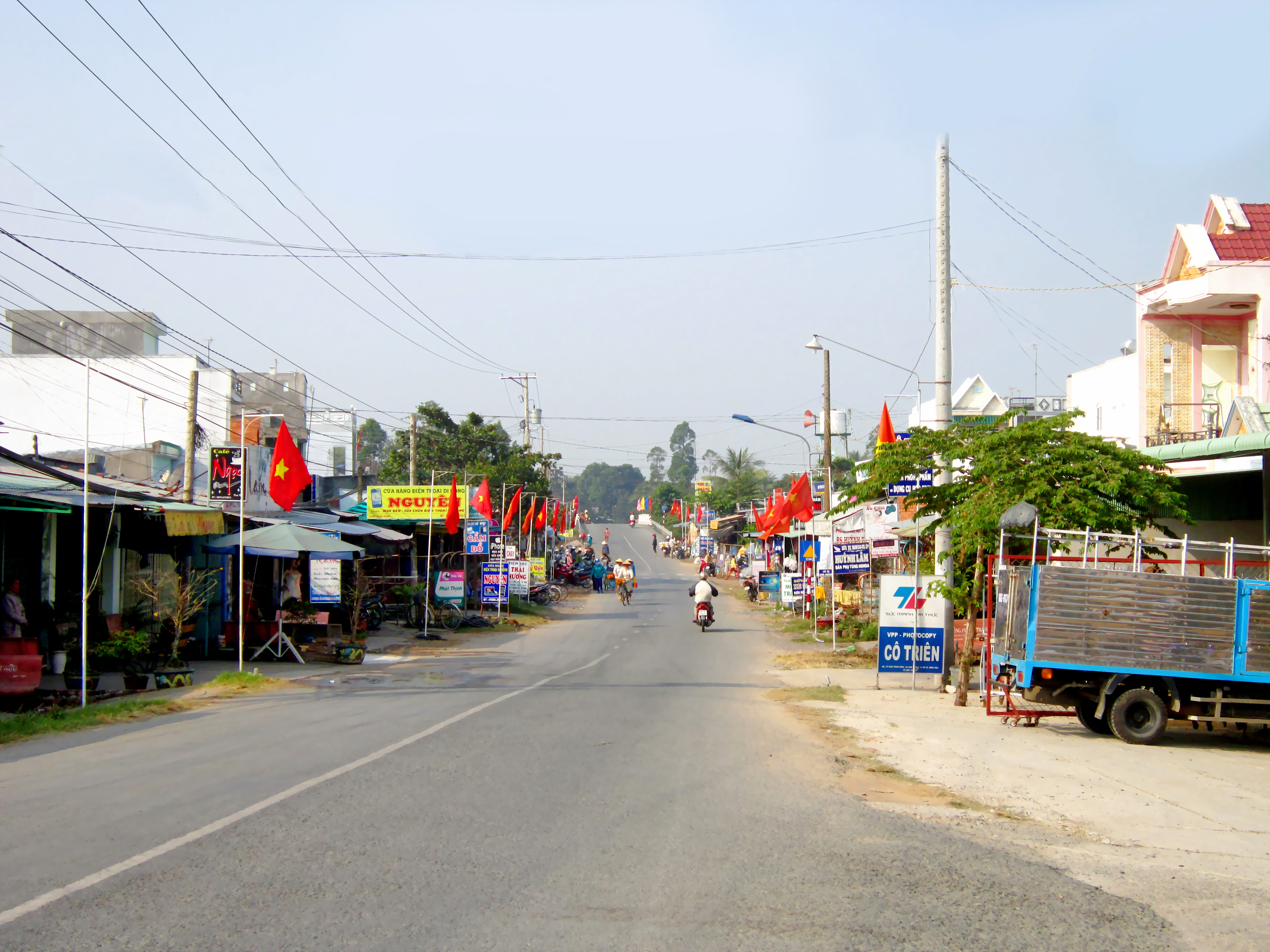 Chợ Vàm Đinh ở xã Long Hưng B, huyện Lấp Vò, Đồng Tháp, Việt Nam.